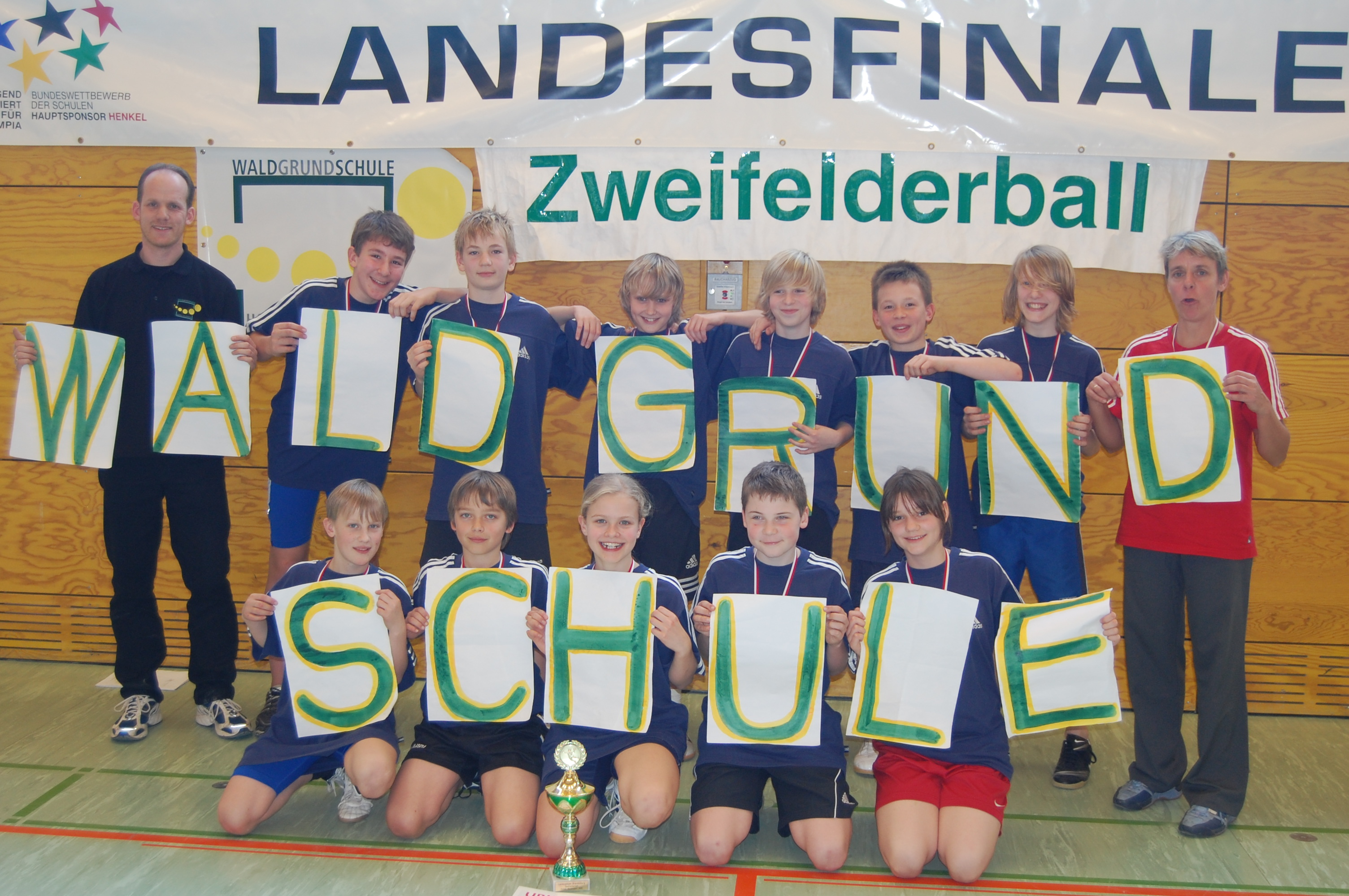 Die Schulmannschaft Zweifelderball der Waldgrundschule Hohen Neuendorf wird 2009 zum dritten Mal in Folge Landesmeister Brandenburg